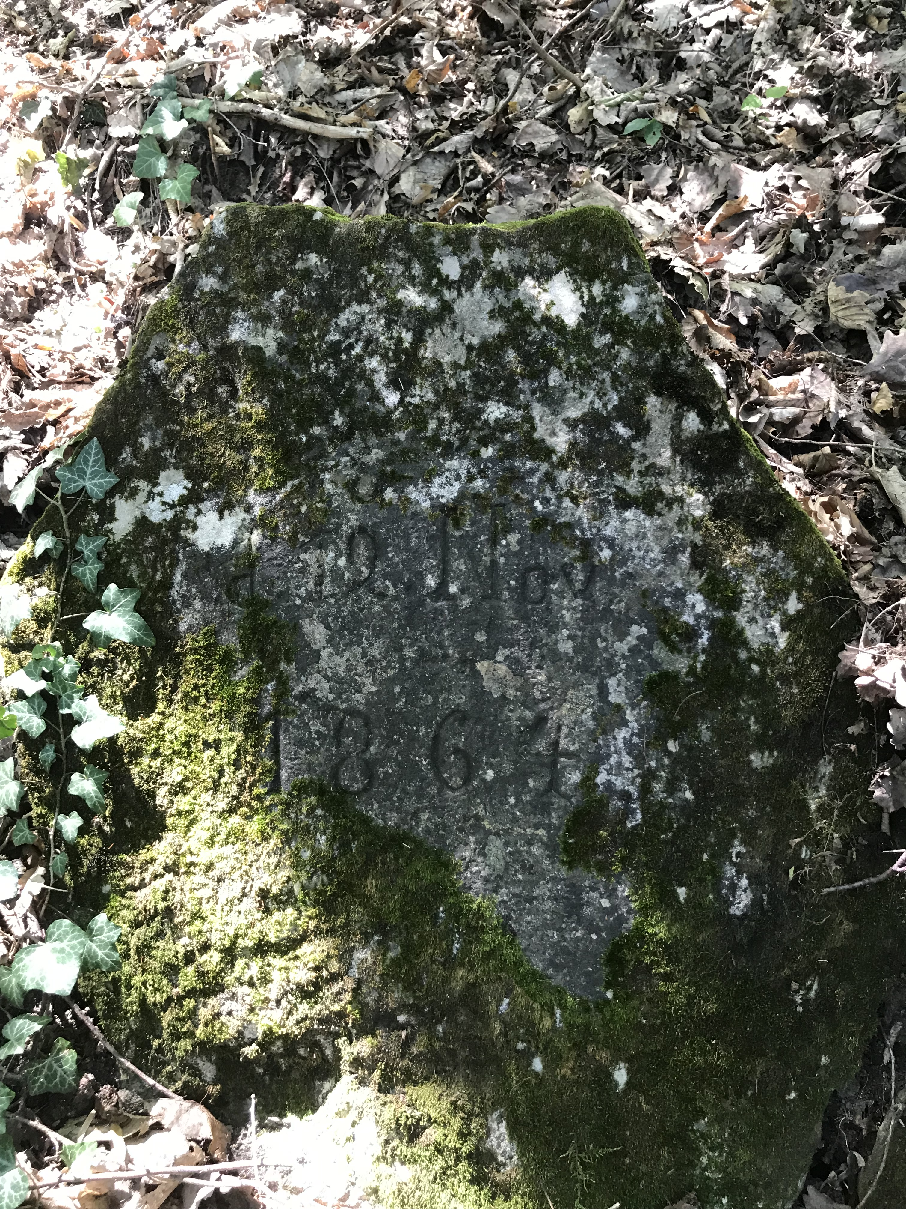 Erinnerungsstein für den Frieden von Wien (1864) in der Fränkenauer Hohle, Bad Kösen